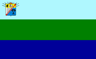 Bandera del municipio Mejía, estado Sucre, Venezuela